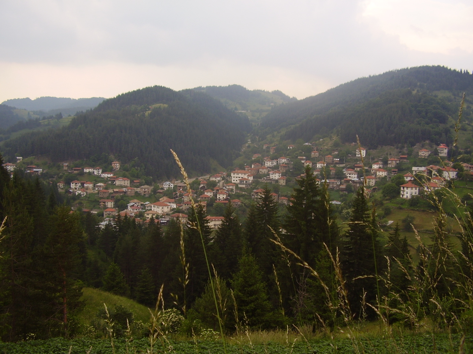 изглед на с.Виево